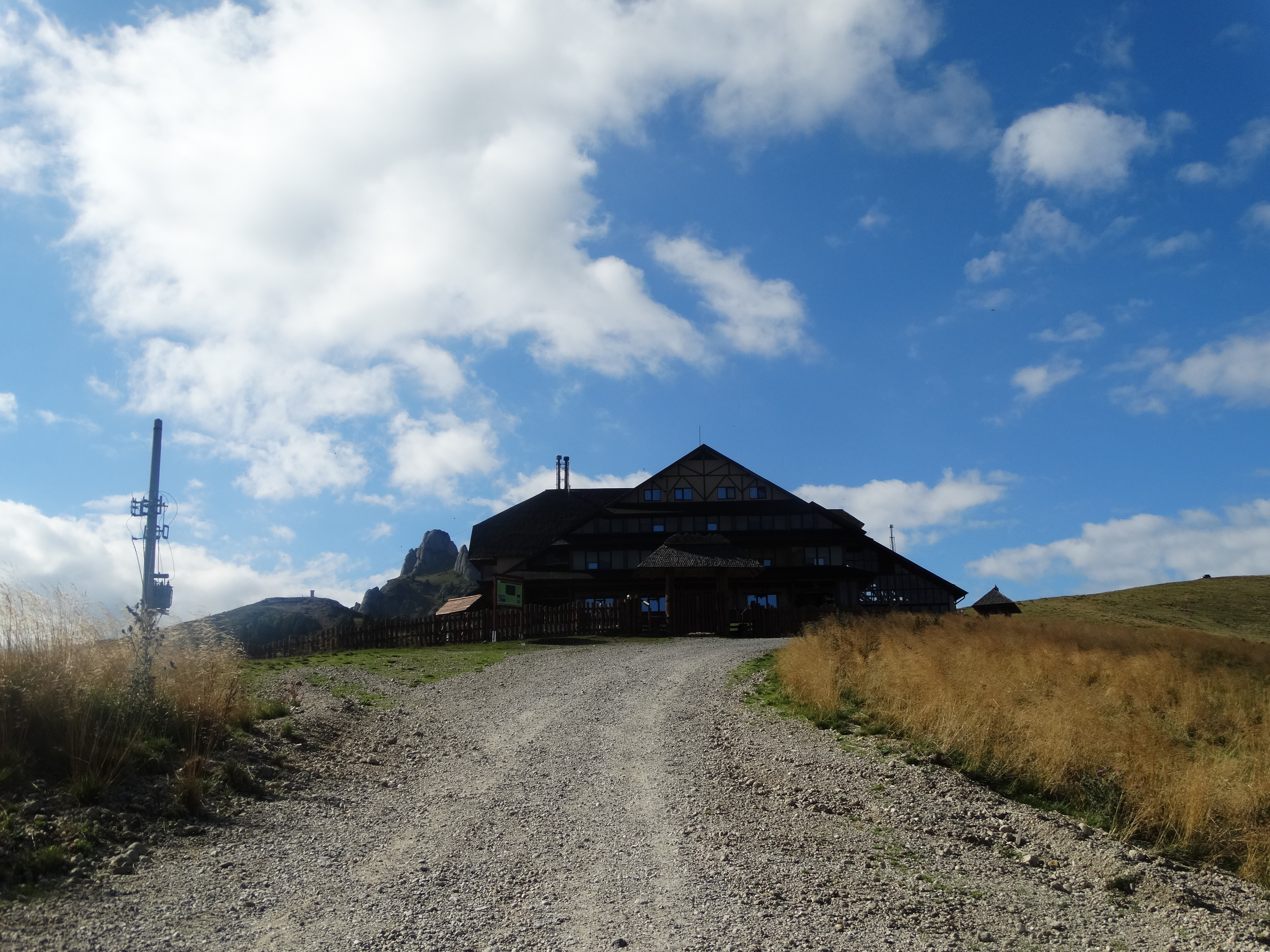 cabana